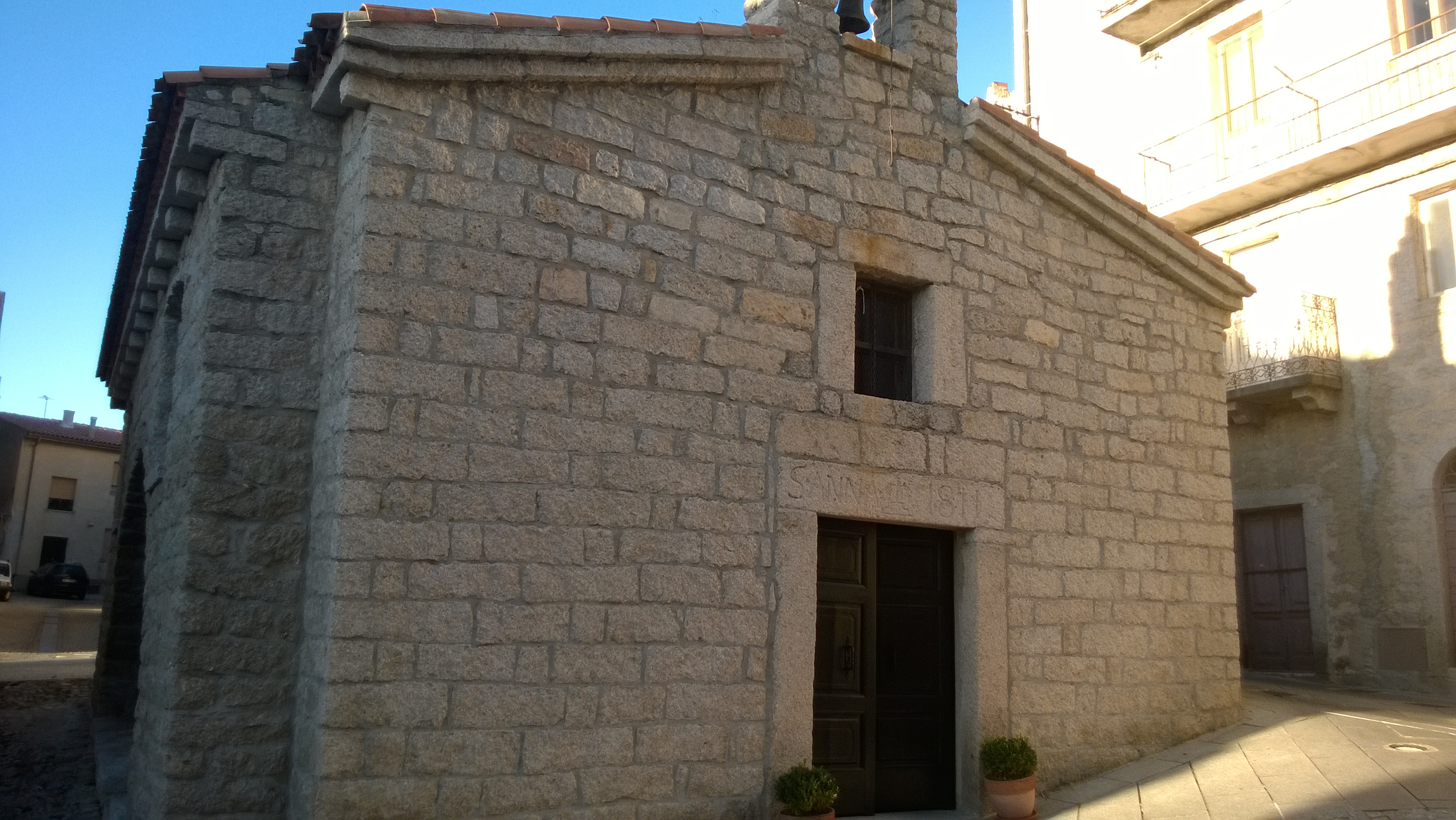 La chiesa di Sant'Anna,situata nel centro storico di Calangianus.